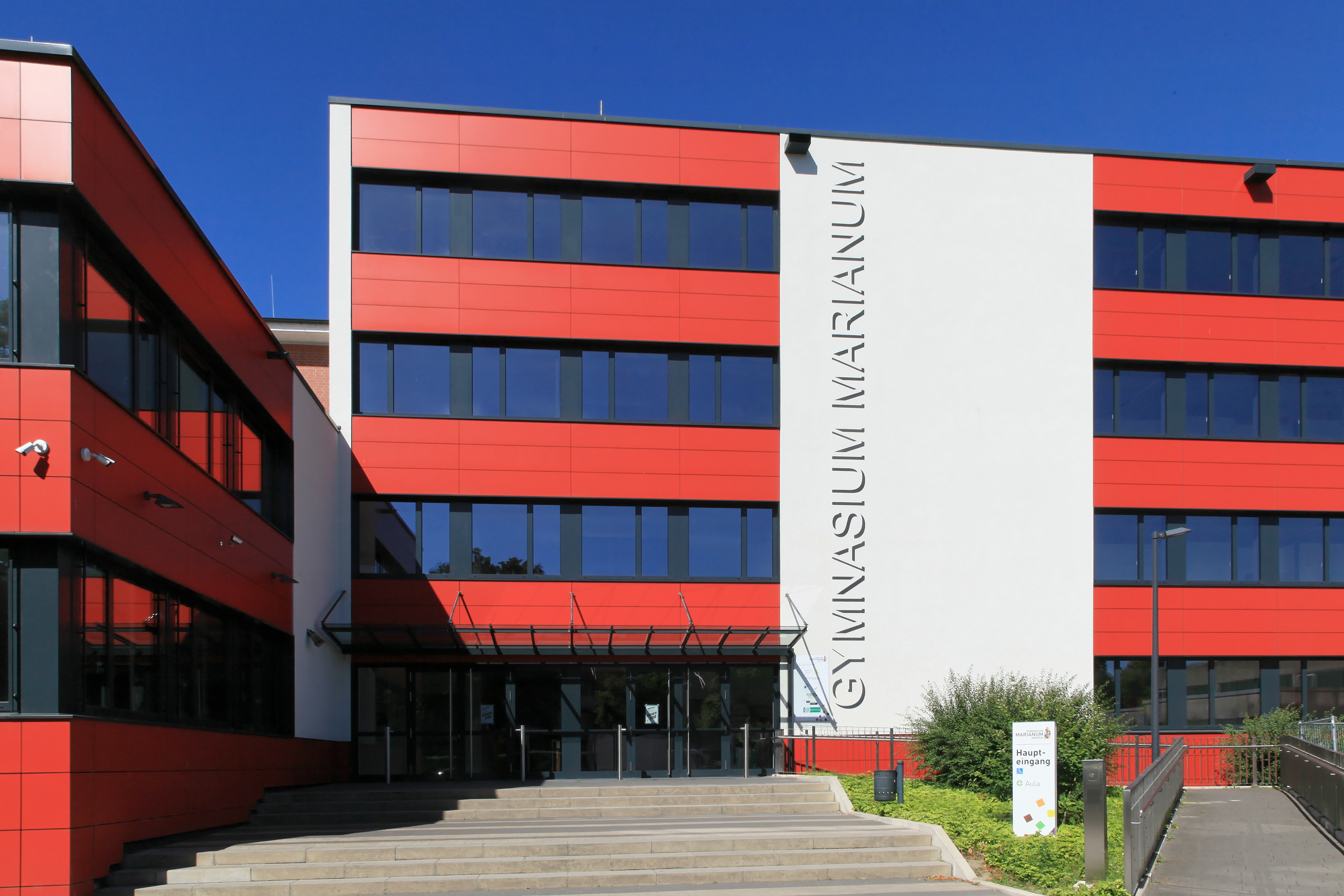 Gymnasium Marianum, Herzog-Arenberg-Straße 65 in Meppen